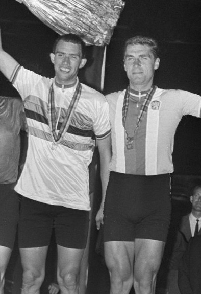 WK Wielrennen, huldiging achtervolging amateurs. Gert Bongers en Jiří Daler (rechts) op podium